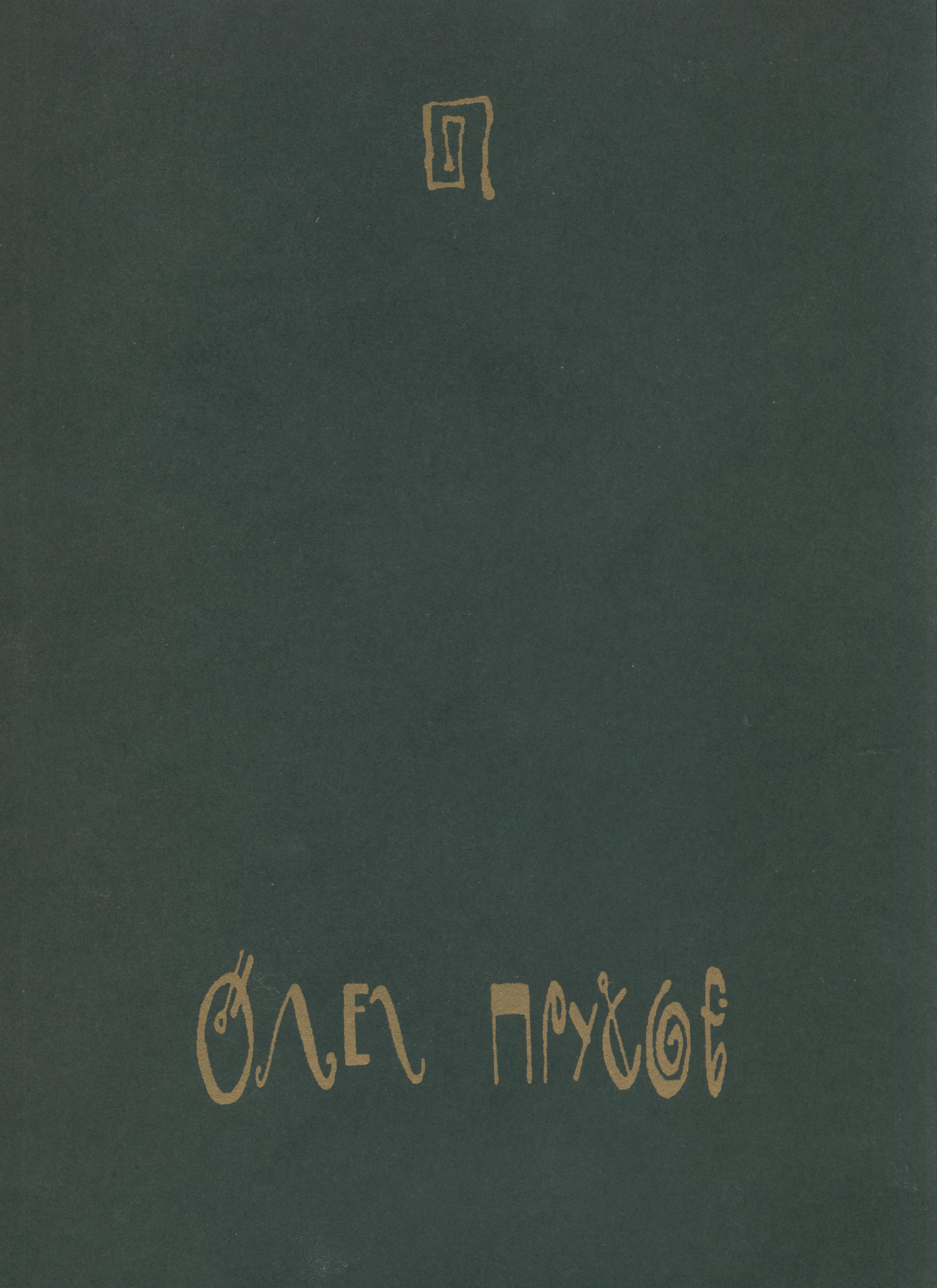 Сборник стихов